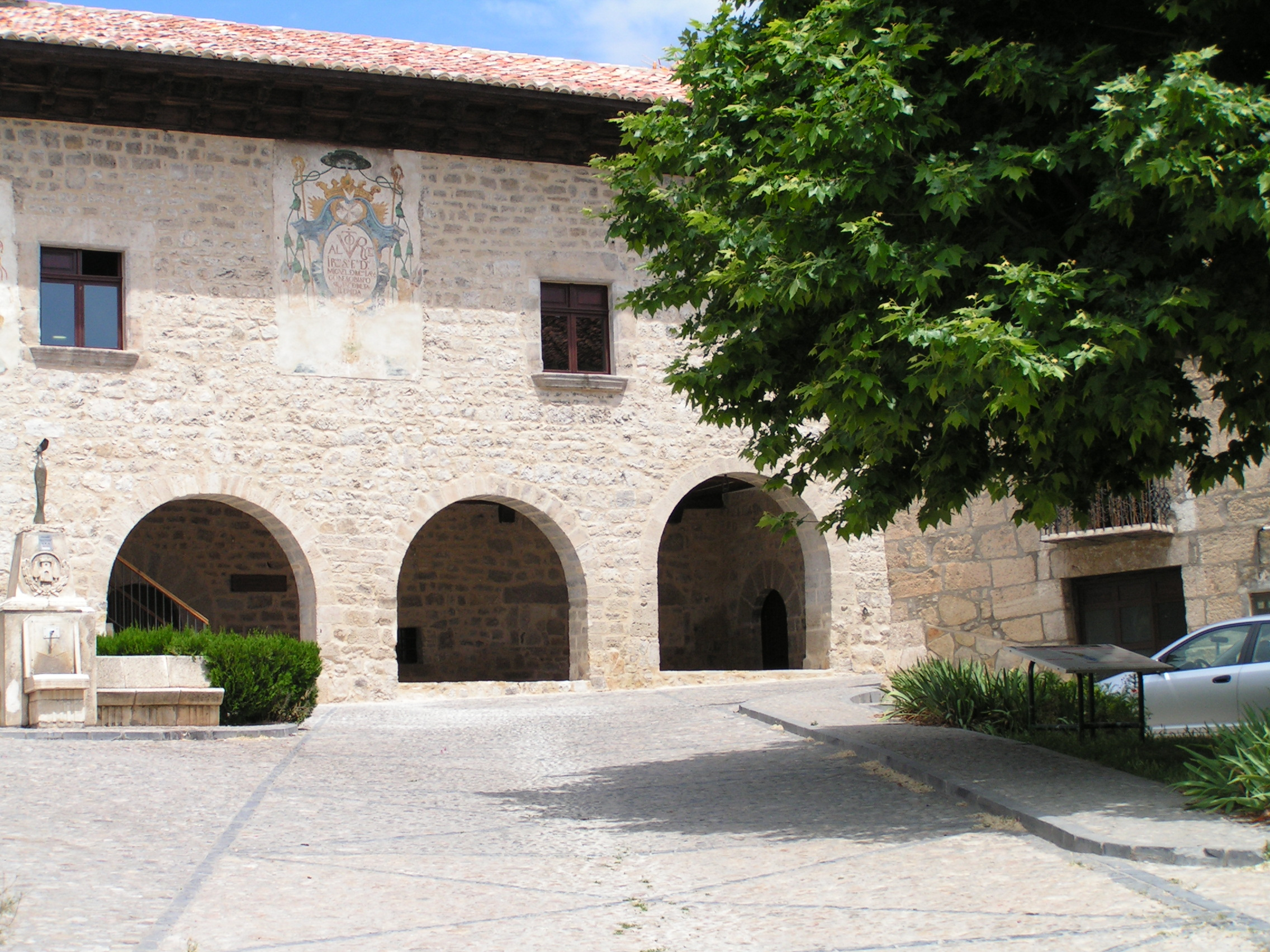 Façana de l'Ajuntament de Fortanete